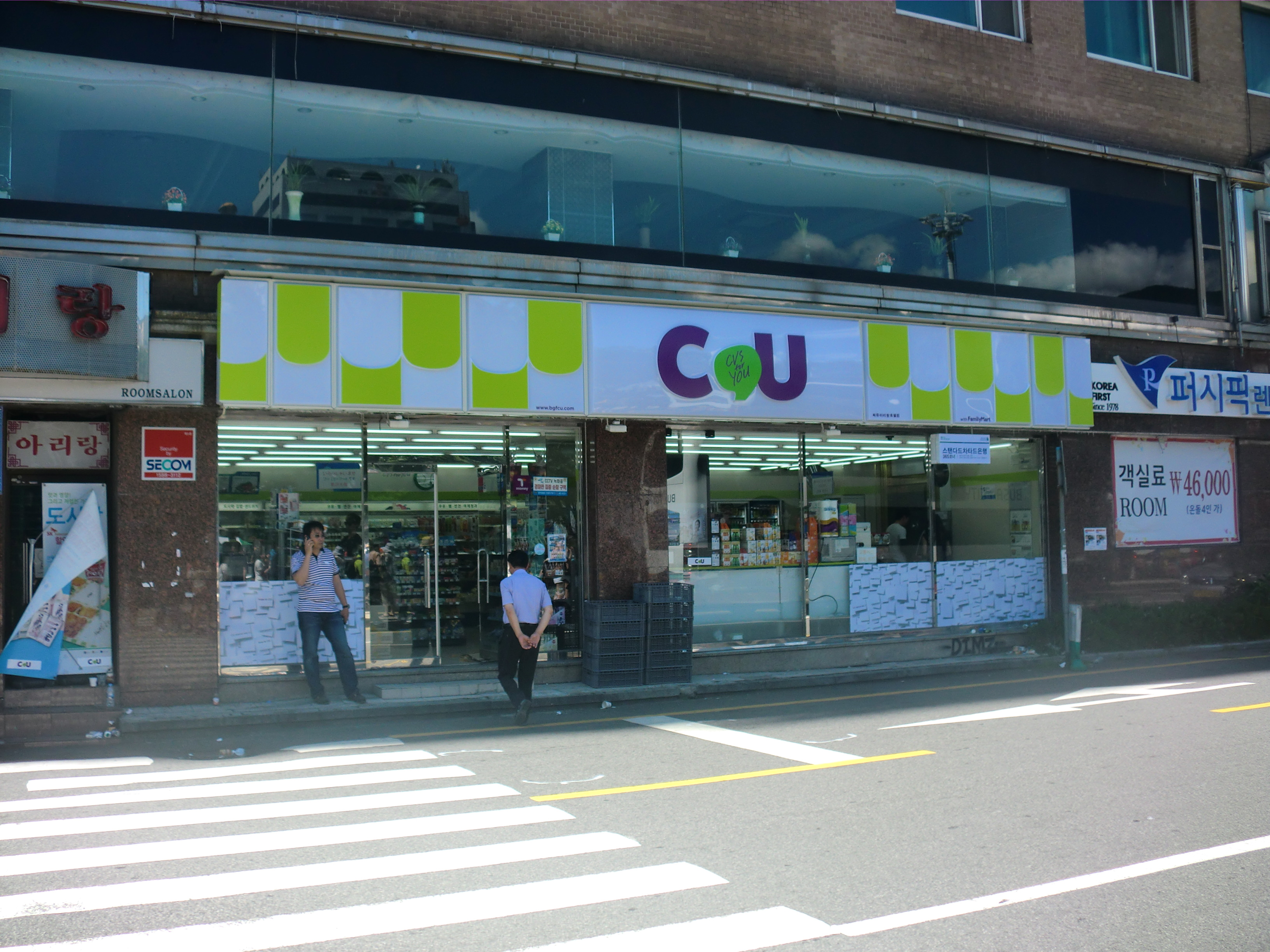 부산광역시 동구에 있는 CU 아리랑호텔점